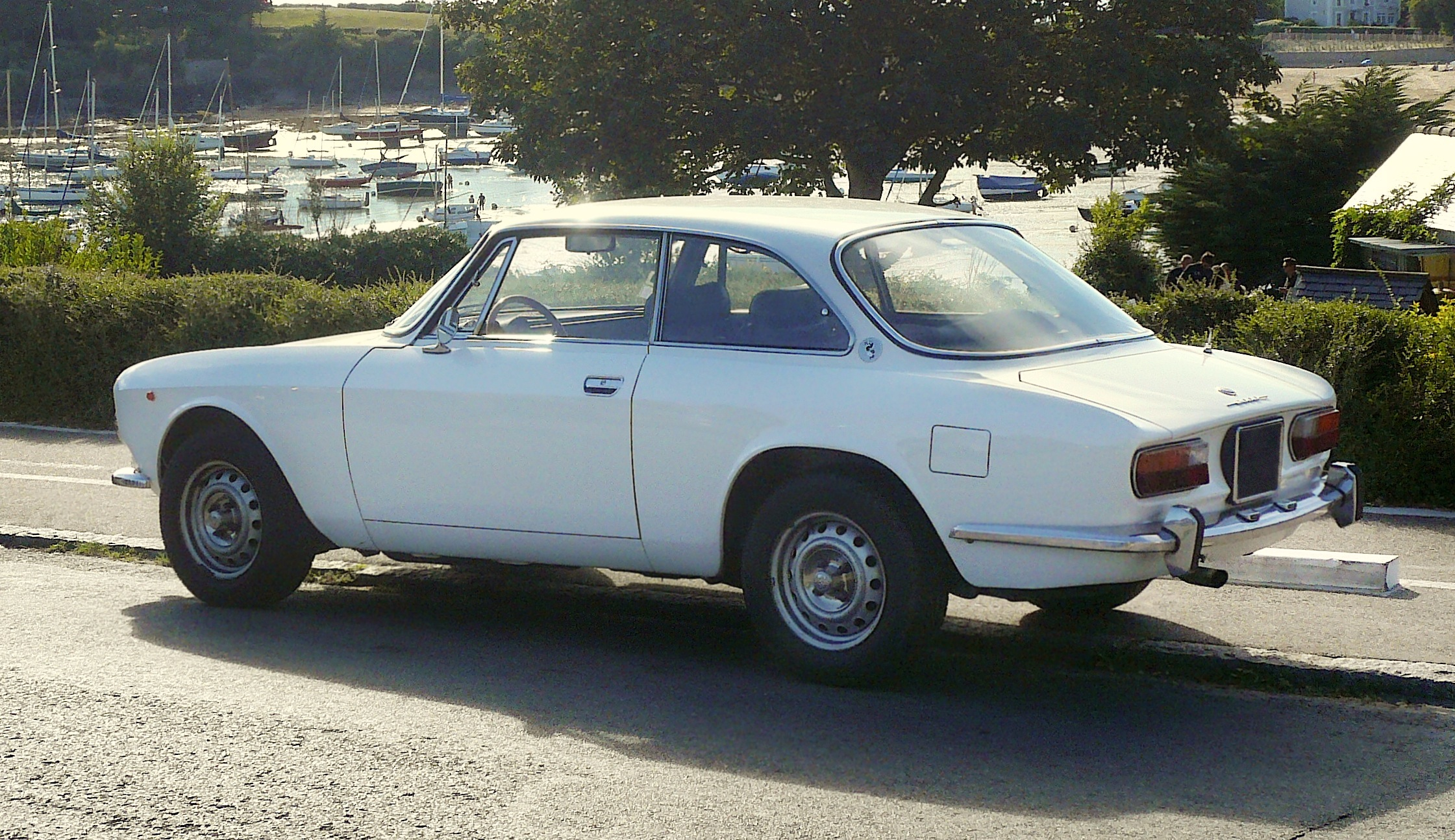 Une Alfa Romeo Giulia GT 2000 (coupé Bertone) vue de ¾ arrière, sur la côte d'Émeraude.